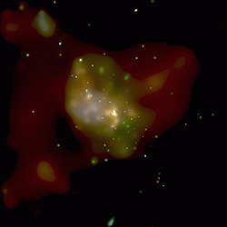 Zwart gat in centrum melkweg: NASA/MIT/F.Baganoff et al